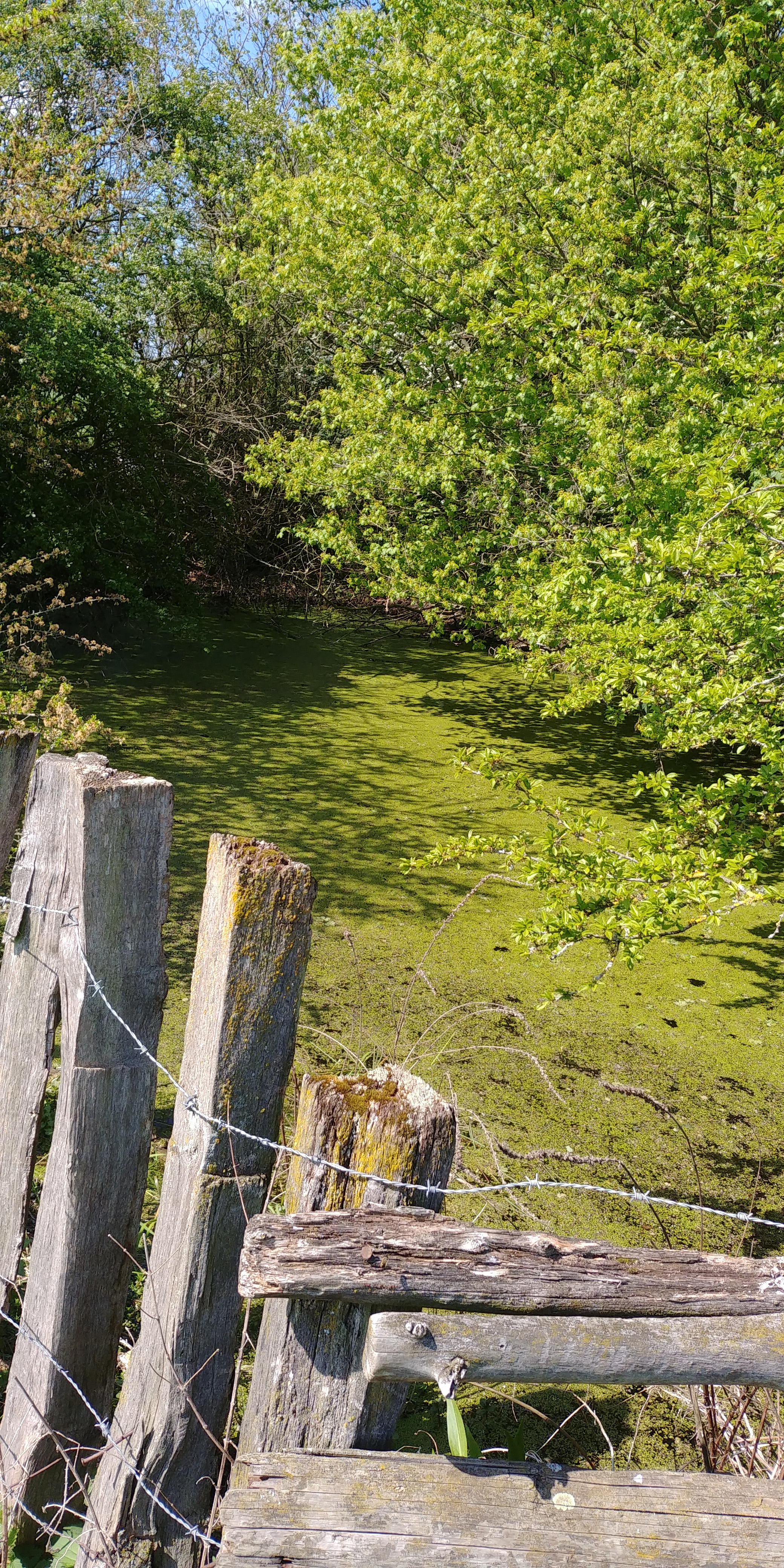 Quelle des Flusses Angel